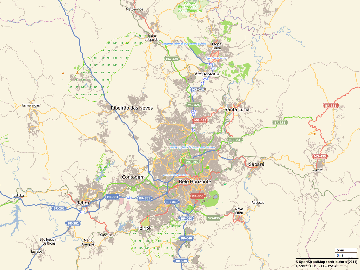 Map: Belo Horizonte (MG / Brazil) and Environs